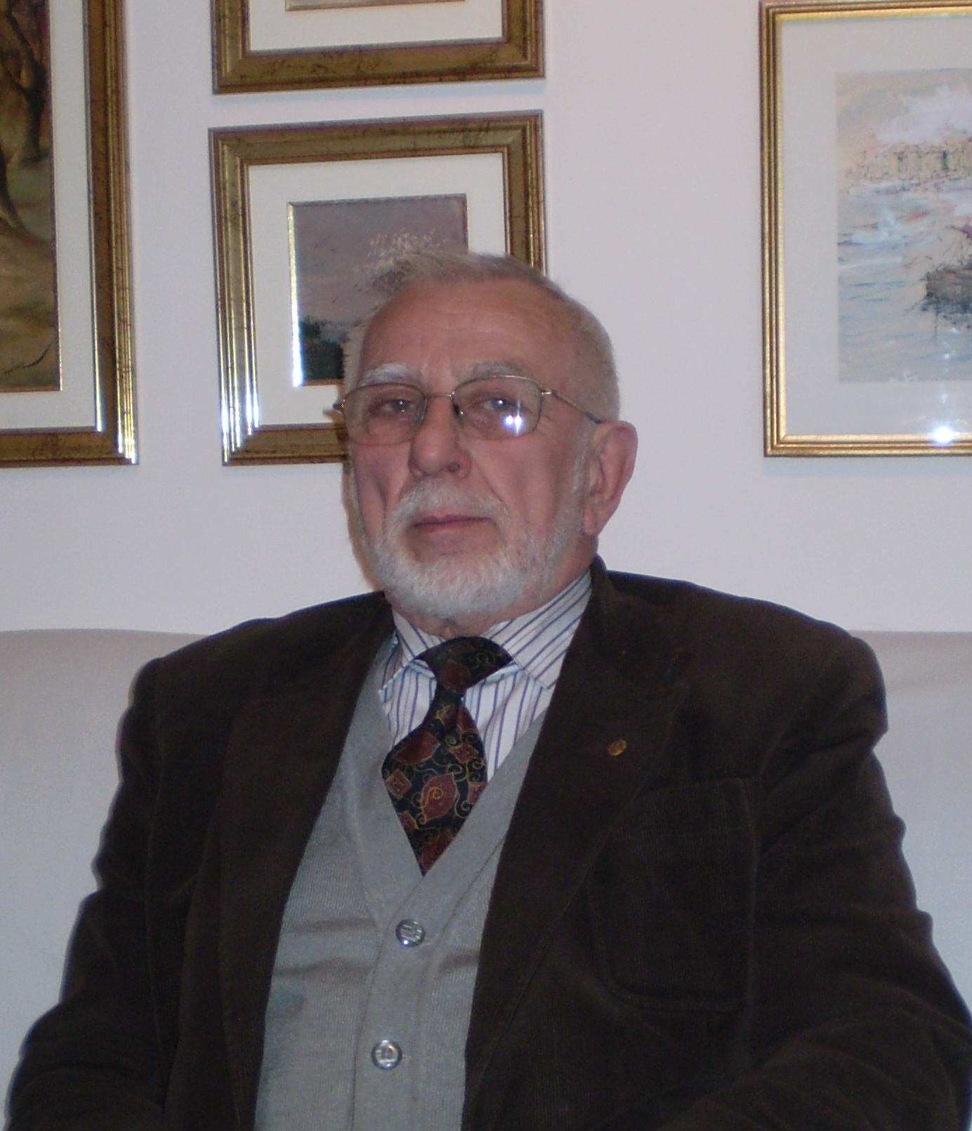 Dr Jovan I. Deretic,autor Nikola Sljivic.